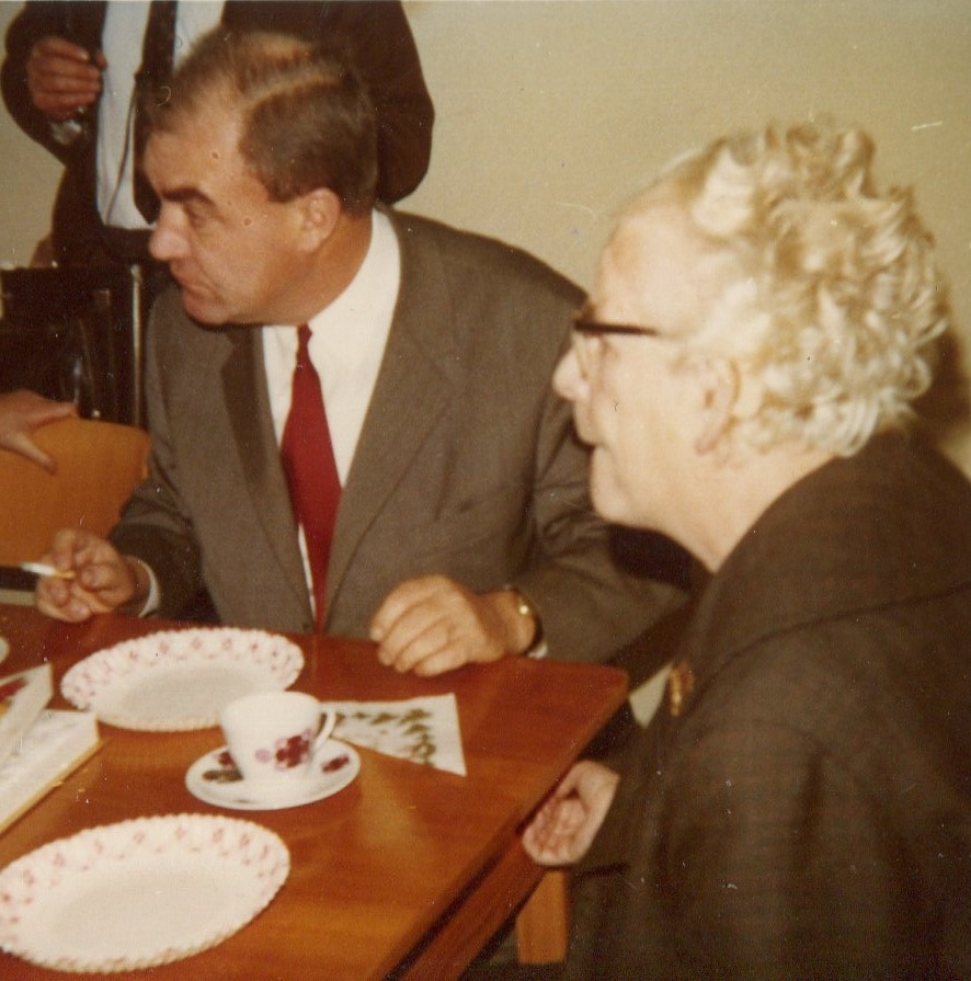 Gertrud Staewen und Helmut Ziegner (Gründer Universalstiftung Helmut Ziegner) bei Dreharbeiten zu dem WDR — Dokumentarfilm Weihnachten in Tegel in dem damaligen Zuchthaus Tegel 1971